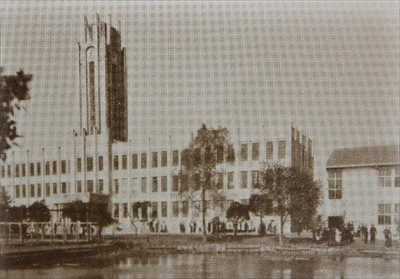 1935年(昭和10年)完成当時の法政大学予科時計塔